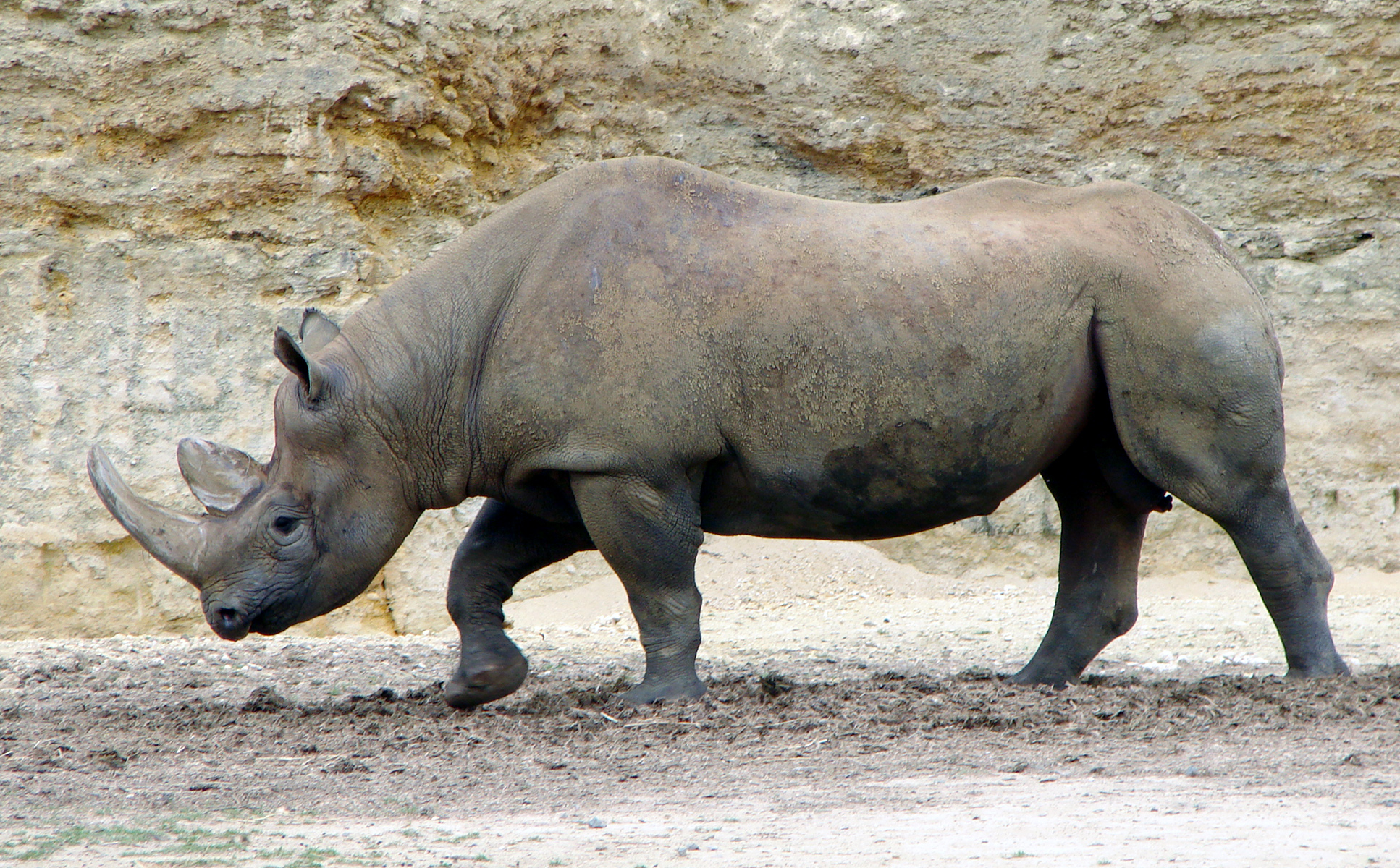 Rhinocéros noir au zoo de Doué-la-Fontaine.